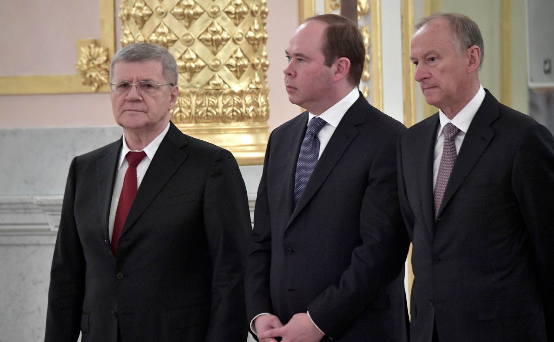 На церемонии представления офицеров и прокуроров, назначенных на вышестоящие должности. Слева направо: Генеральный прокурор Юрий Чайка, Руководитель Администрации Президента Антон Вайно и Секретарь Совета Безопасности Николай Патрушев